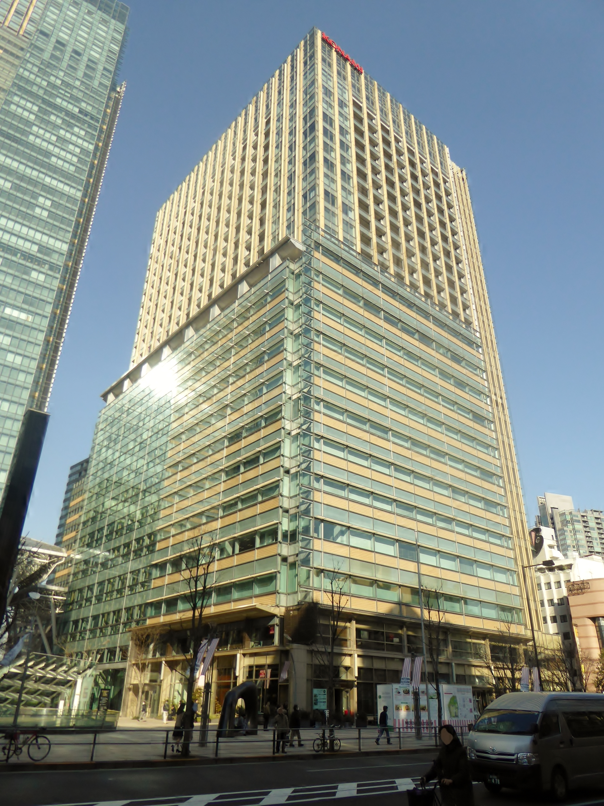 コナミ株式会社本社を撮影。